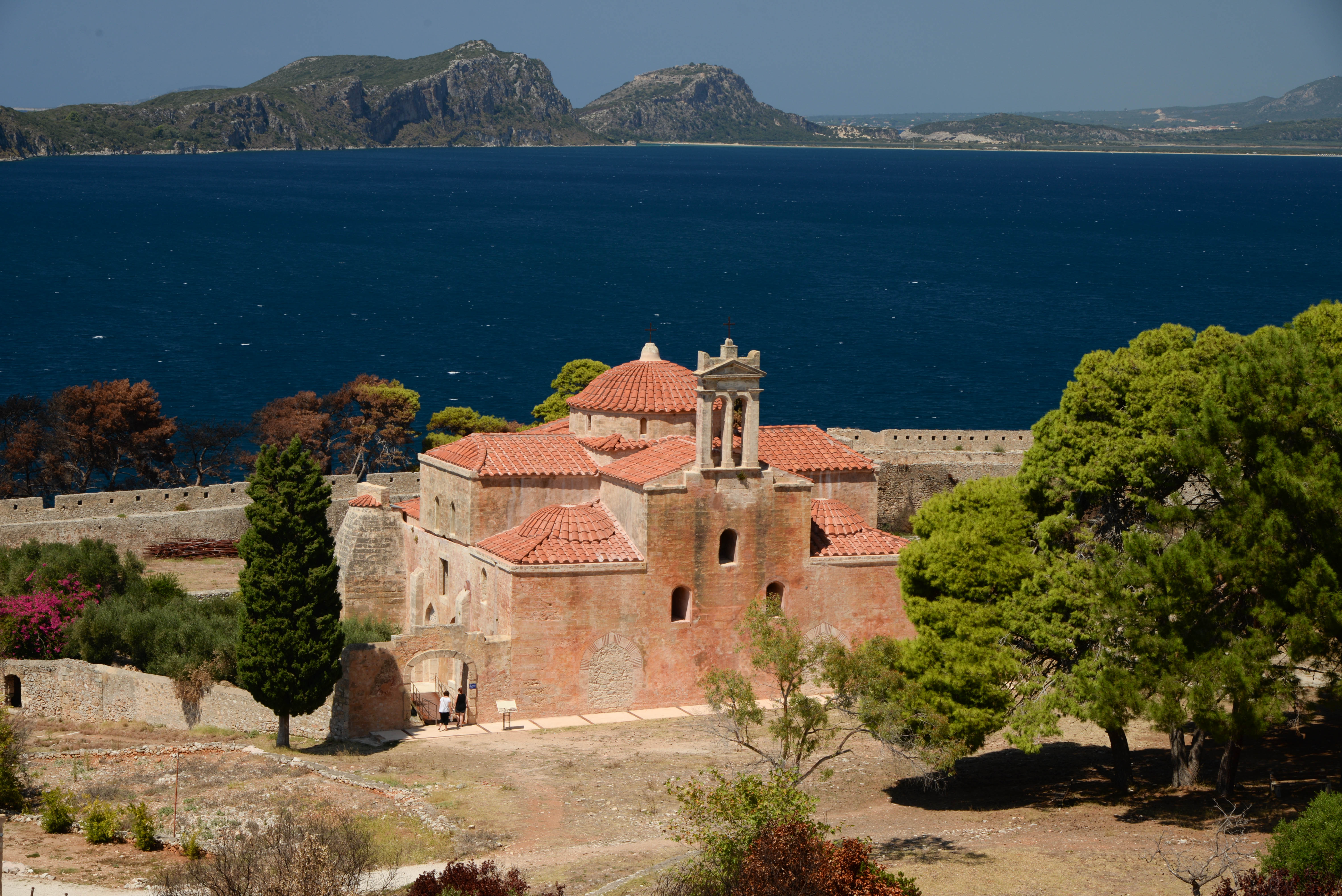 Κάστρο Πύλου - Νιόκαστρο Ναός Μεταμορφώσεως του Σωτήρος (Θέα απο το κάστρο)«Κάστρο Πύλου - Νιόκαστρο»